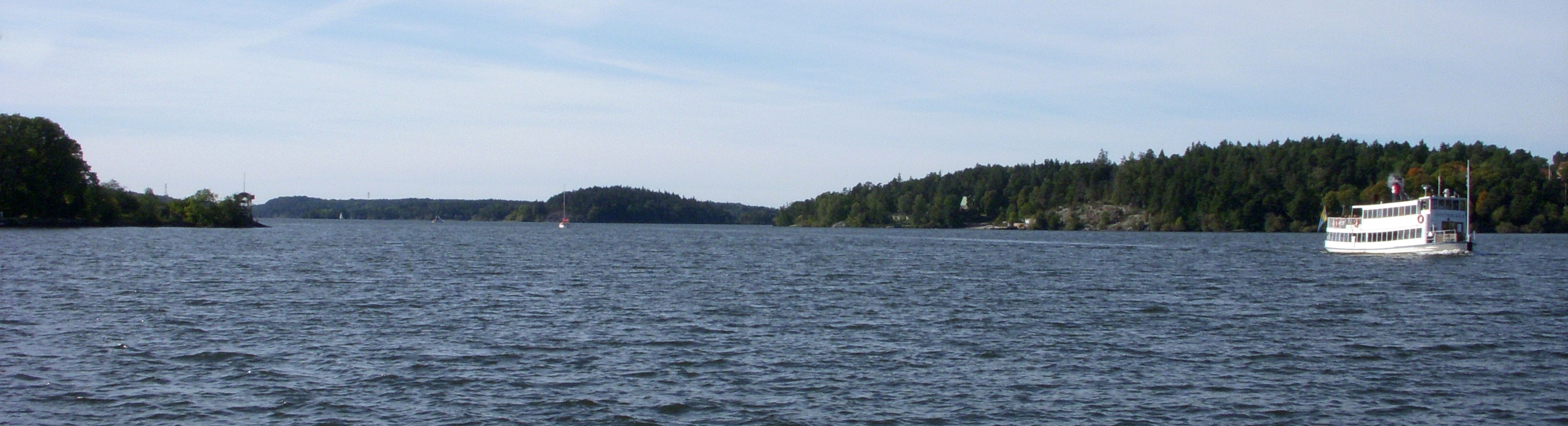 Östra Mälaren västerut i höjd med Smedslätten/Hägersten